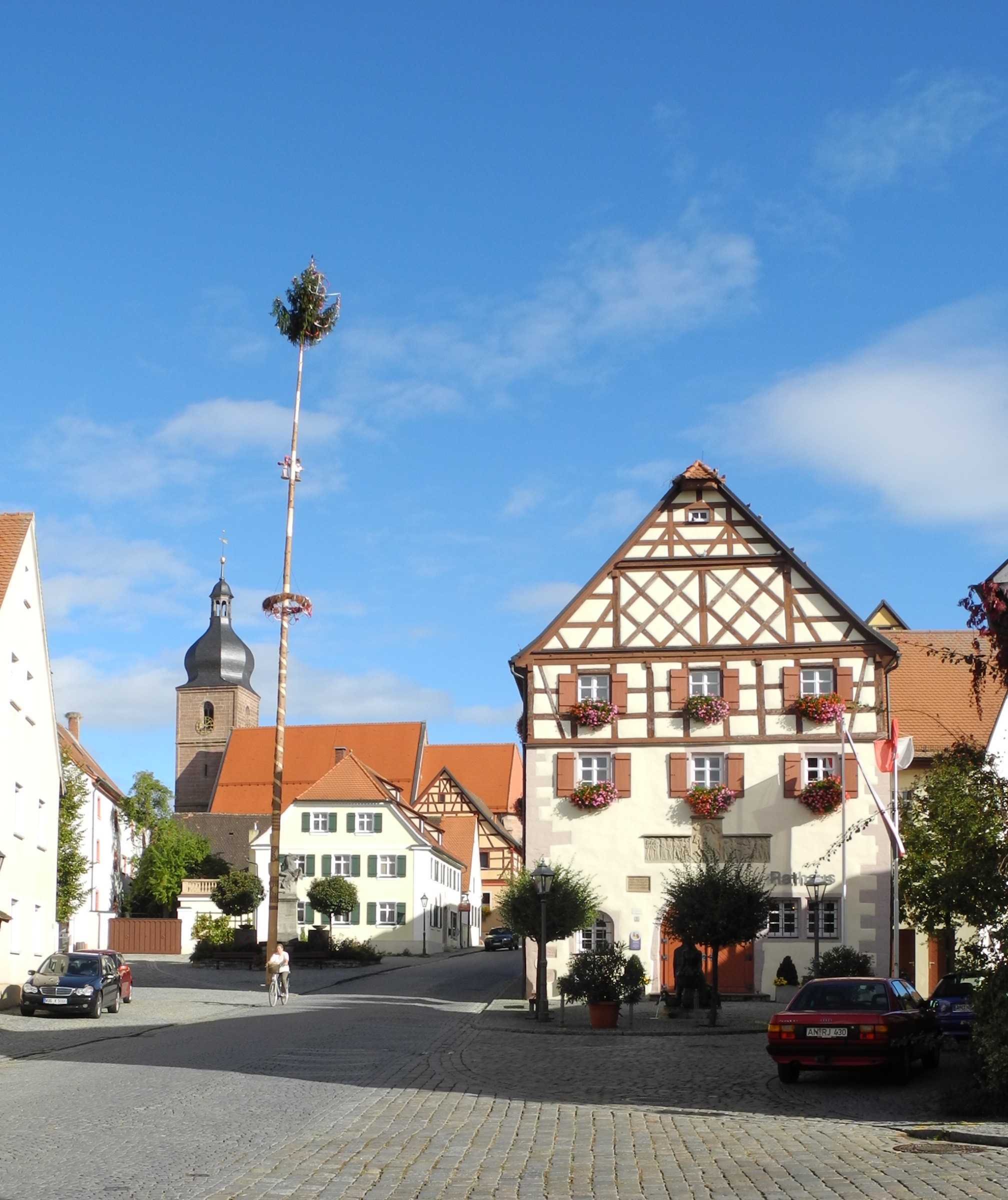 Merkendorf - Ortszentrum mit Rathaus und Kirchweihbaum